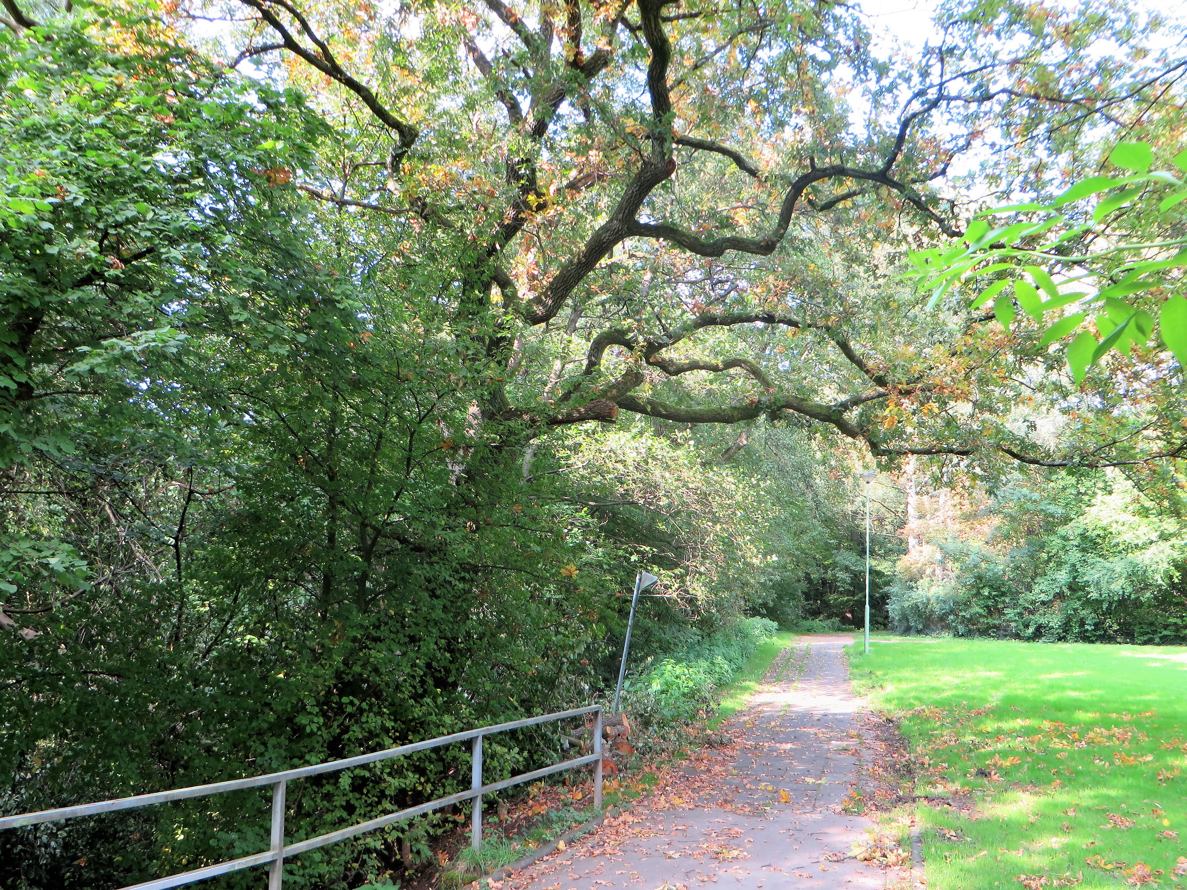 Geschützter Landschaftsbestandteil 1.4.2.54 „Quambusch“ in Hagen, westlich des Kindergartens und Spielplatzes Quambusch. Es handelt sich um eine Baum- und Gehölzreihe (Foto links) mit acht mächtigen Stieleichen, die entlang eines Grabens verläuft, sowie um einen einmündenden Bachlauf (links vorne) mit Ufergehölzen.